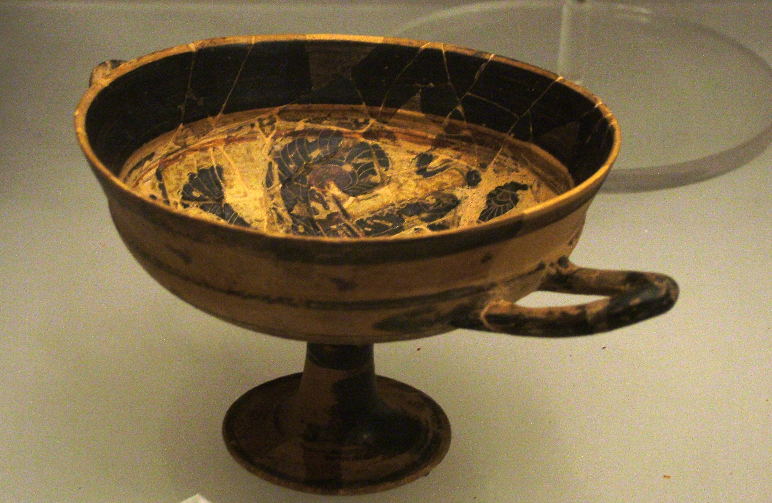 Etruszk kerámiatál (Etruszk Nemzeti Múzeum, Róma)